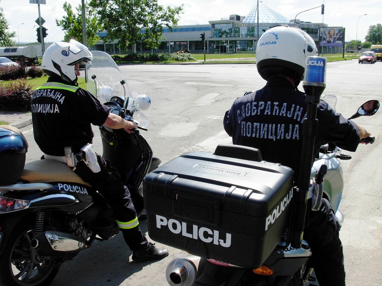 Pripadnici saobraćajne policije na motorima u Novom Sadu.